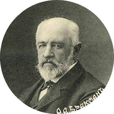 Оттон Федорович Бенеке, перновский городской голова, член III Государственной думы от Лифляндской губернии.